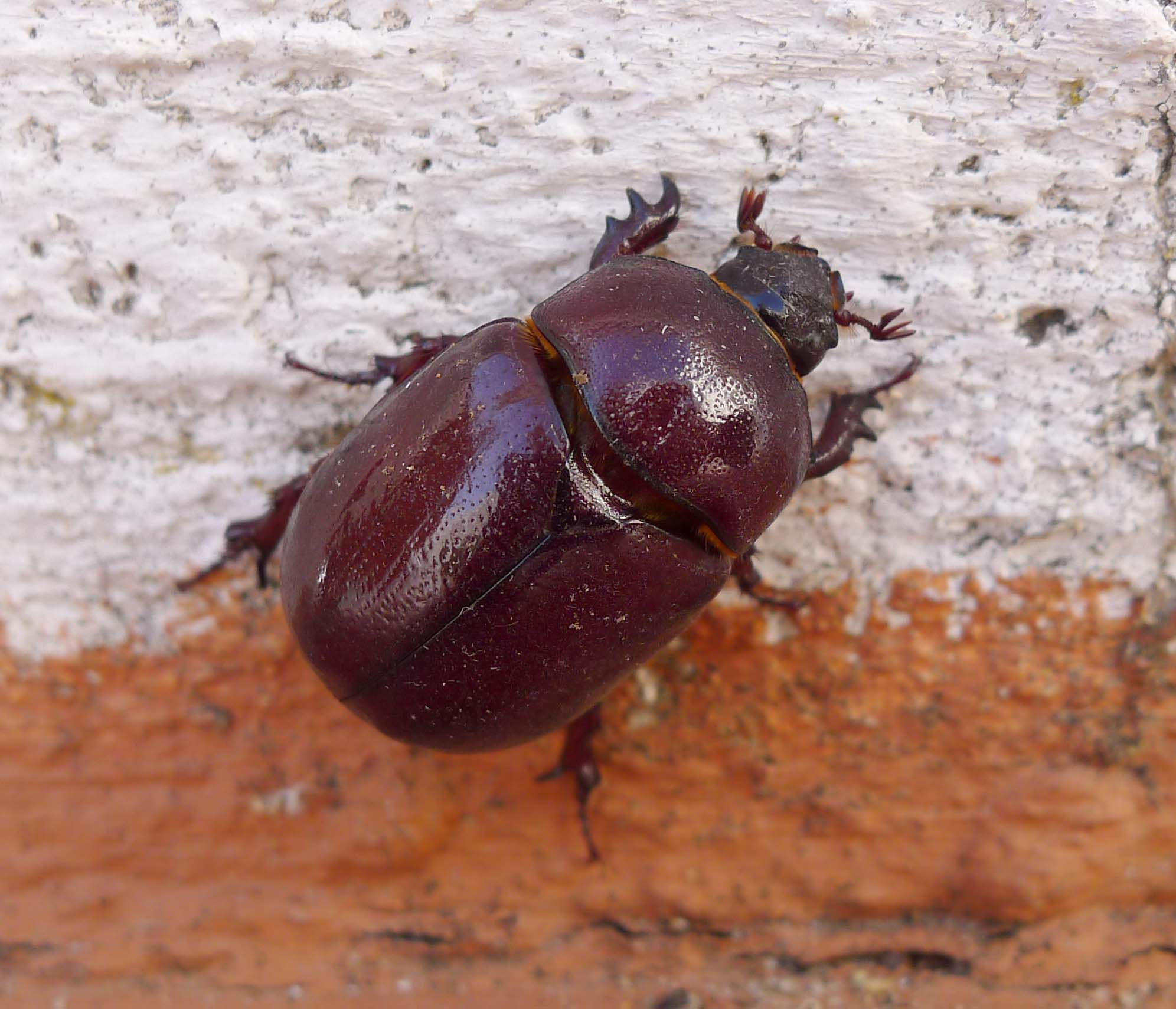 Jimena, Cadiz Province, Andalucia, Spain